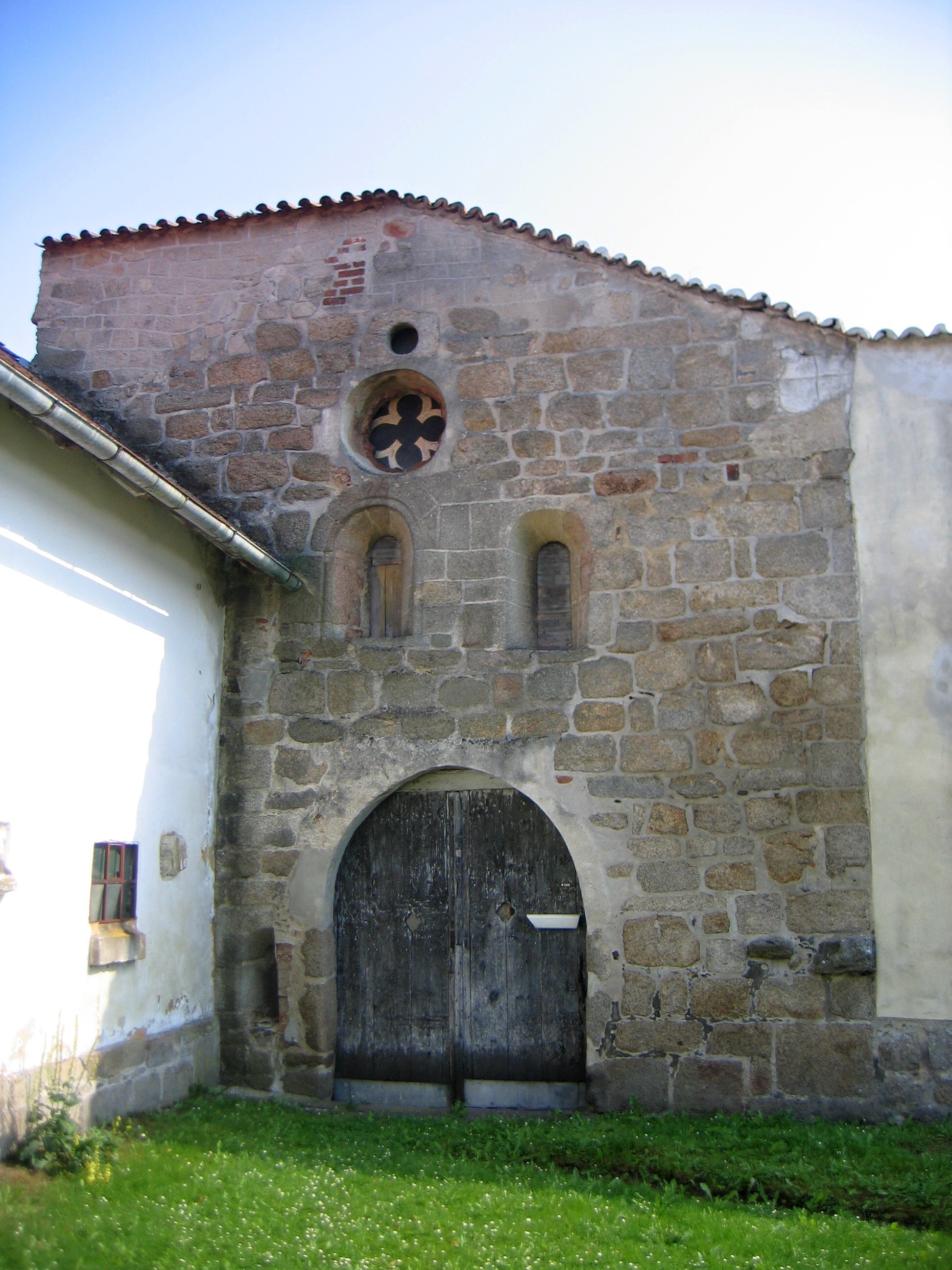 Klášter cisterciáků - fragmenty (Klášter), Klášter